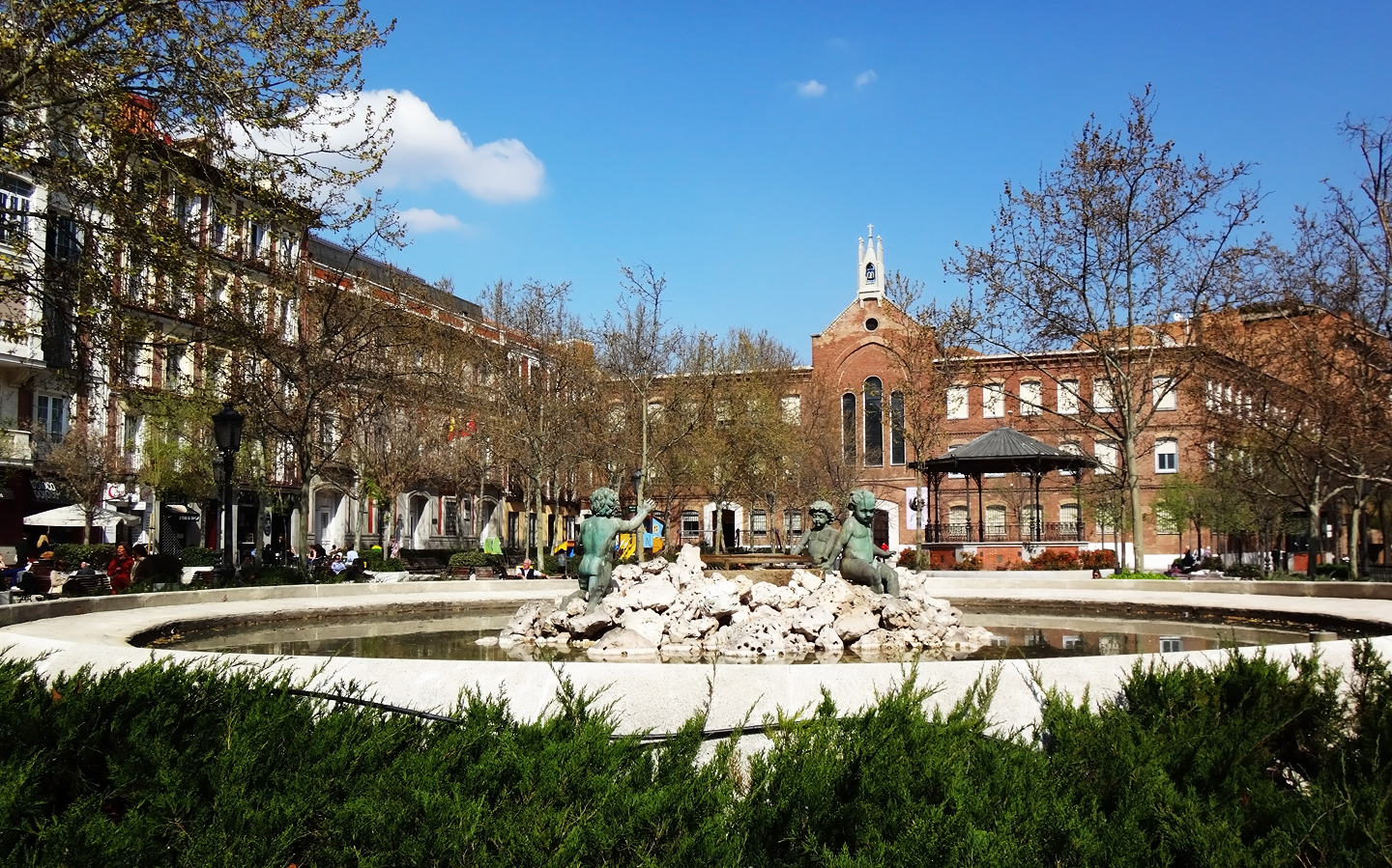 Площадь Шамбери